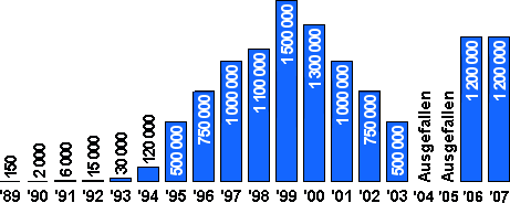 Love Parade 2007 Essen Besucherzahlen UPDATE